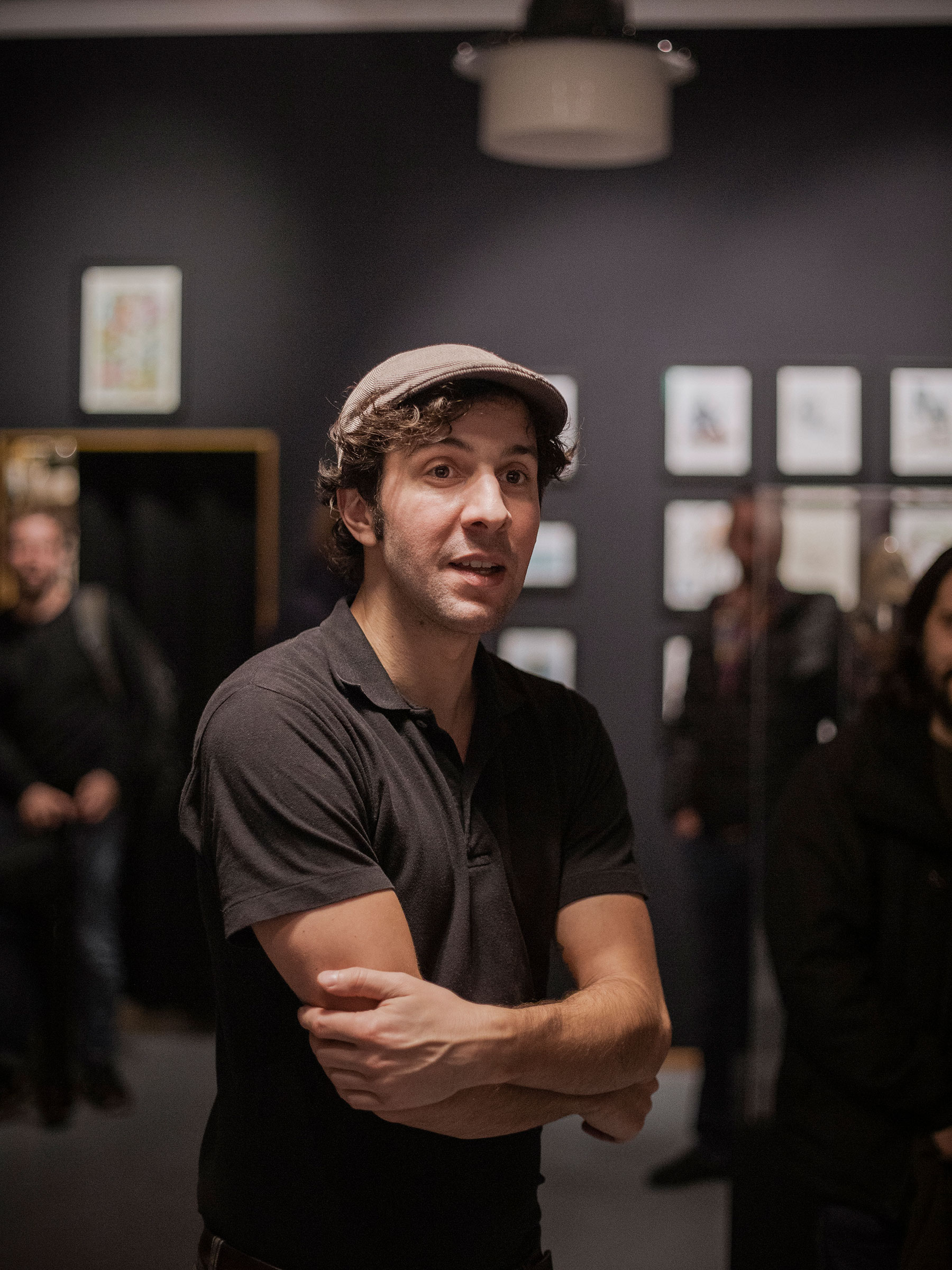 Portrait - Sebastian Pohl